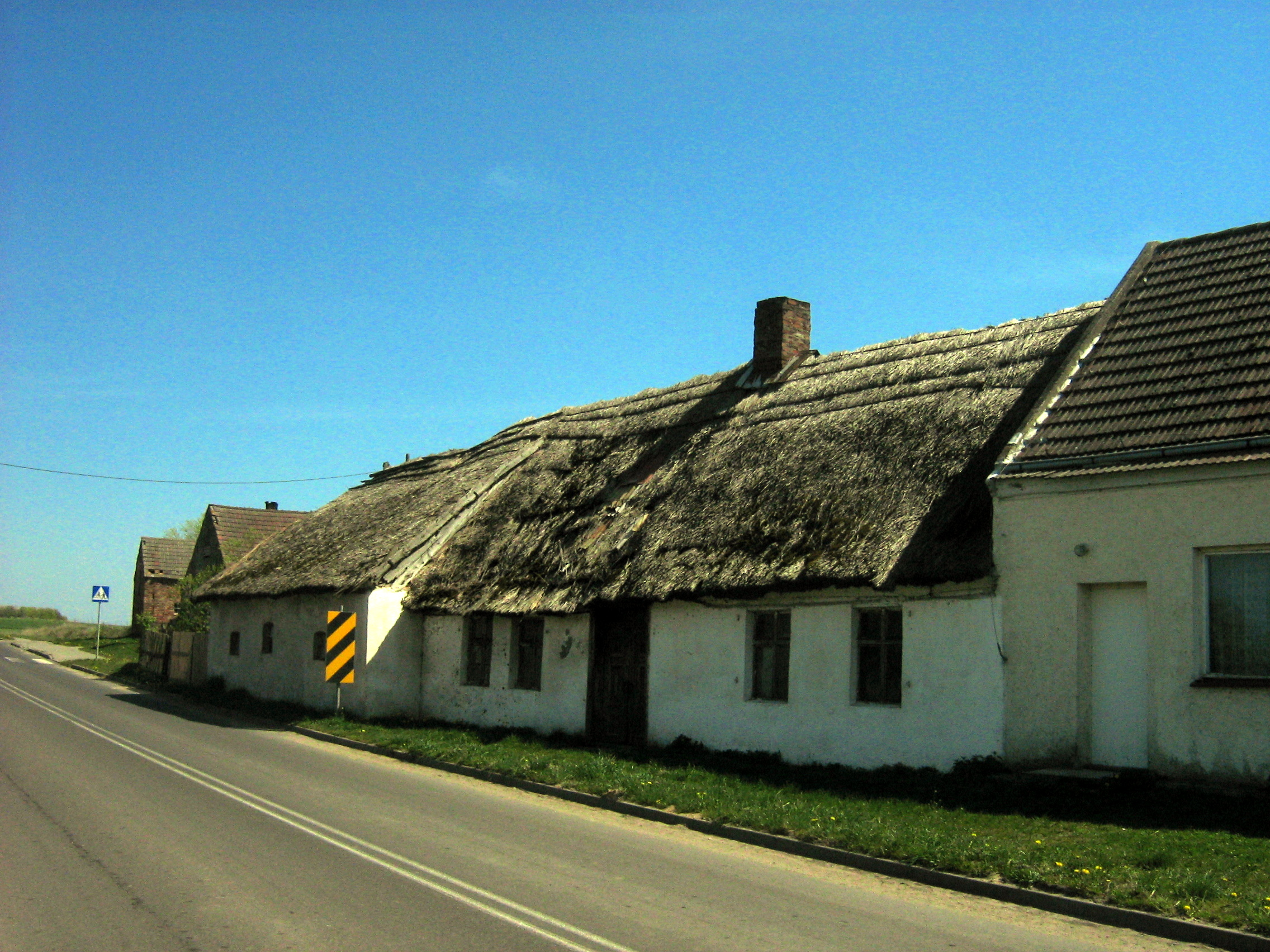 Zabytkowy dom w Korzęcinie.